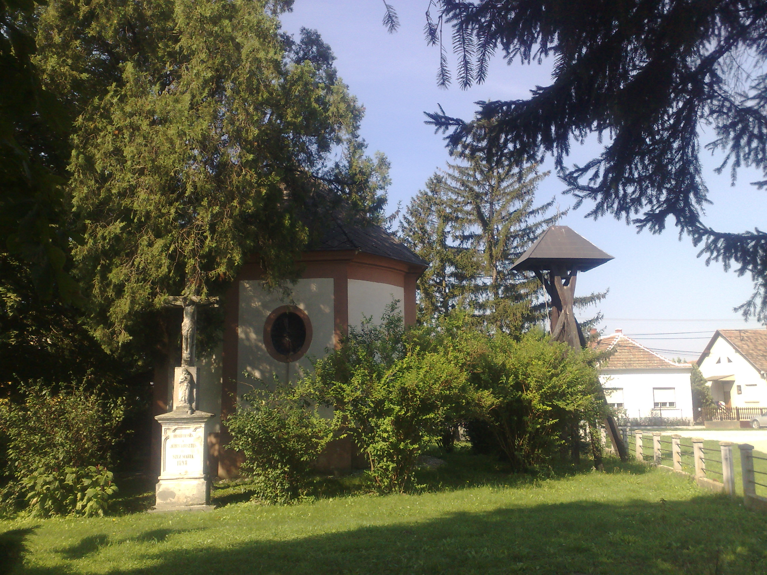 A Kápolna tér Árpáson: Nepomuki Szent János-kápolna, harangláb, kőkereszt